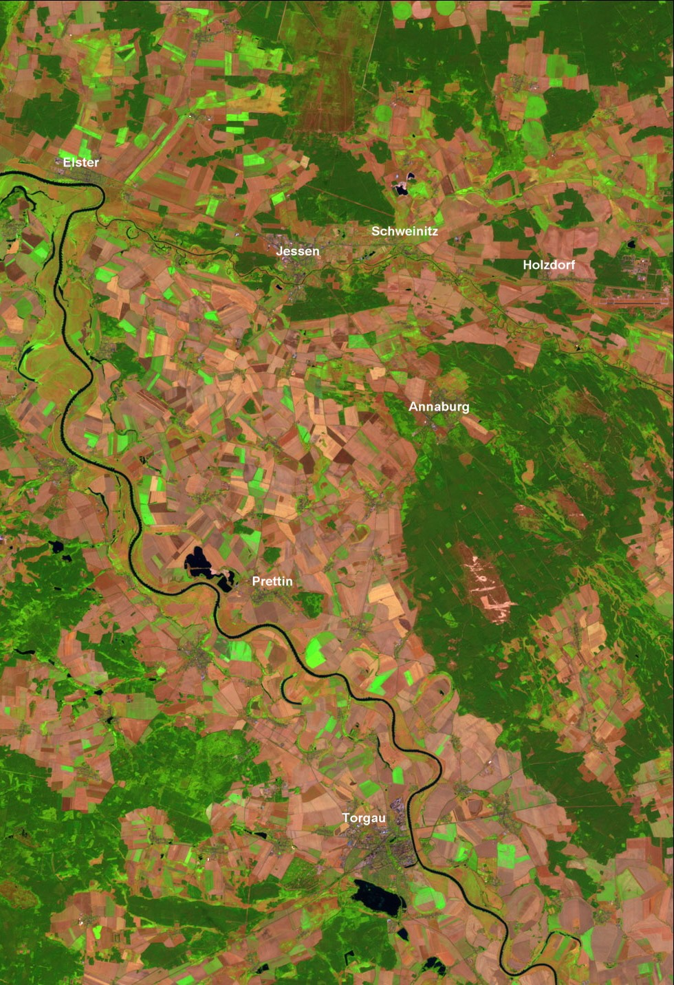 Elbe-Elster-Niederung vor der Elbe-Flut am 14. August 2002